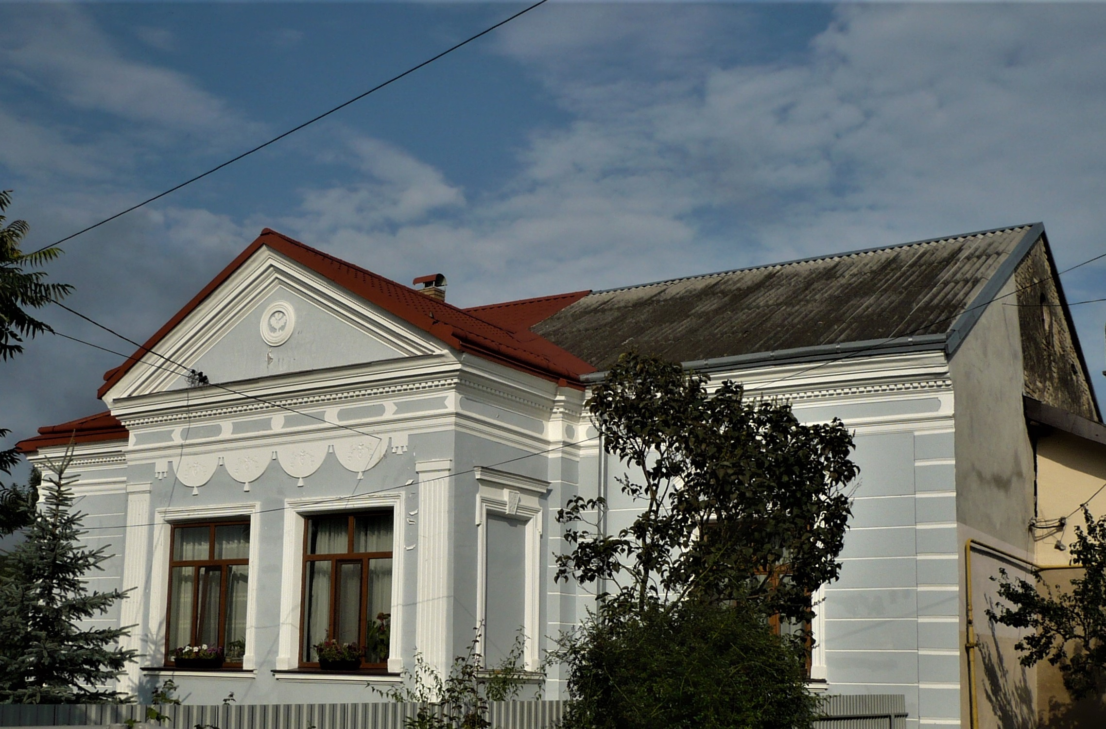 Dom w Złoczowie